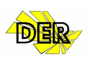 Bandeira do Departamento de Estradas de Rodagem do Estado de São Paulo